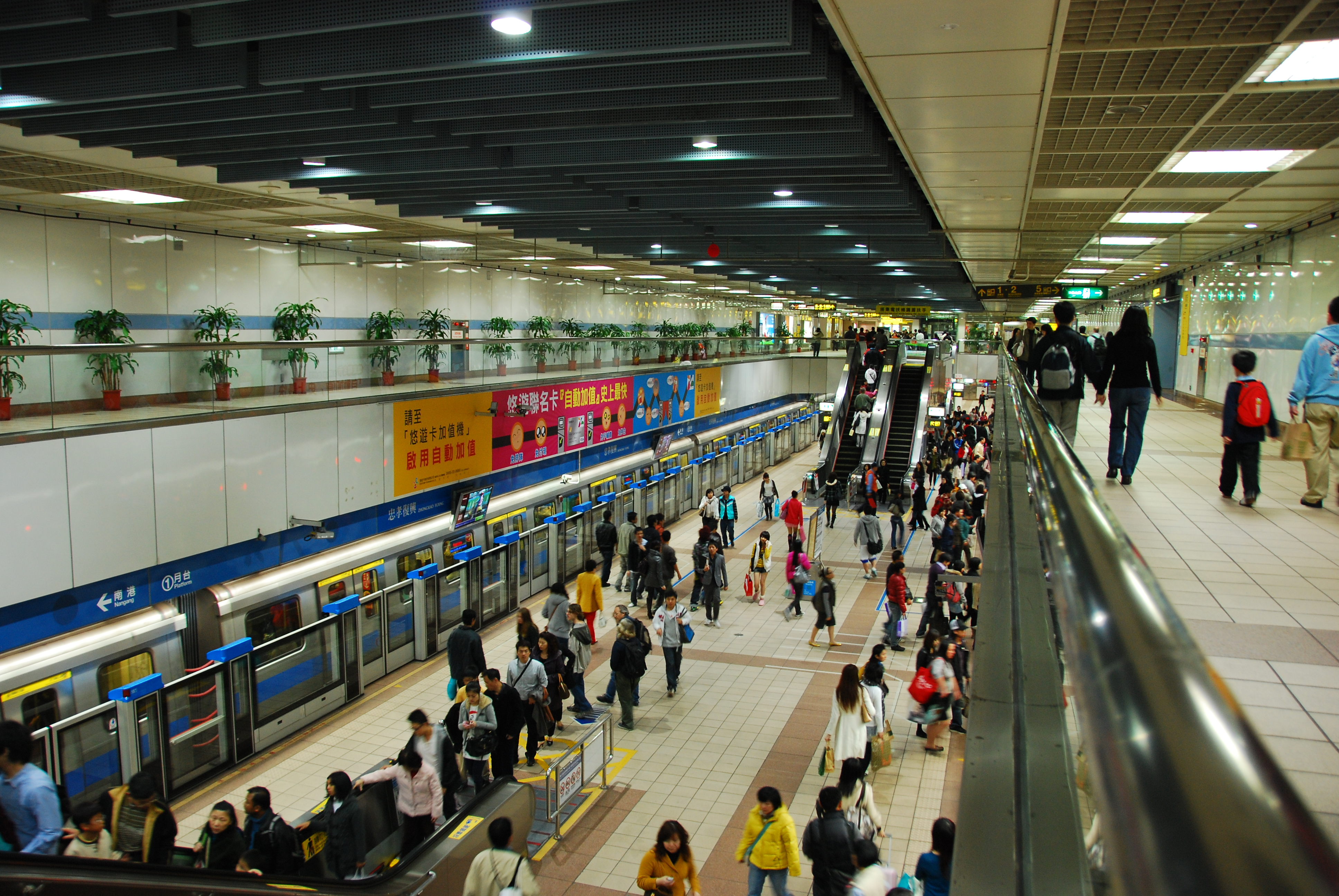 中文（台灣）: 台北捷運忠孝復興站藍線月台層